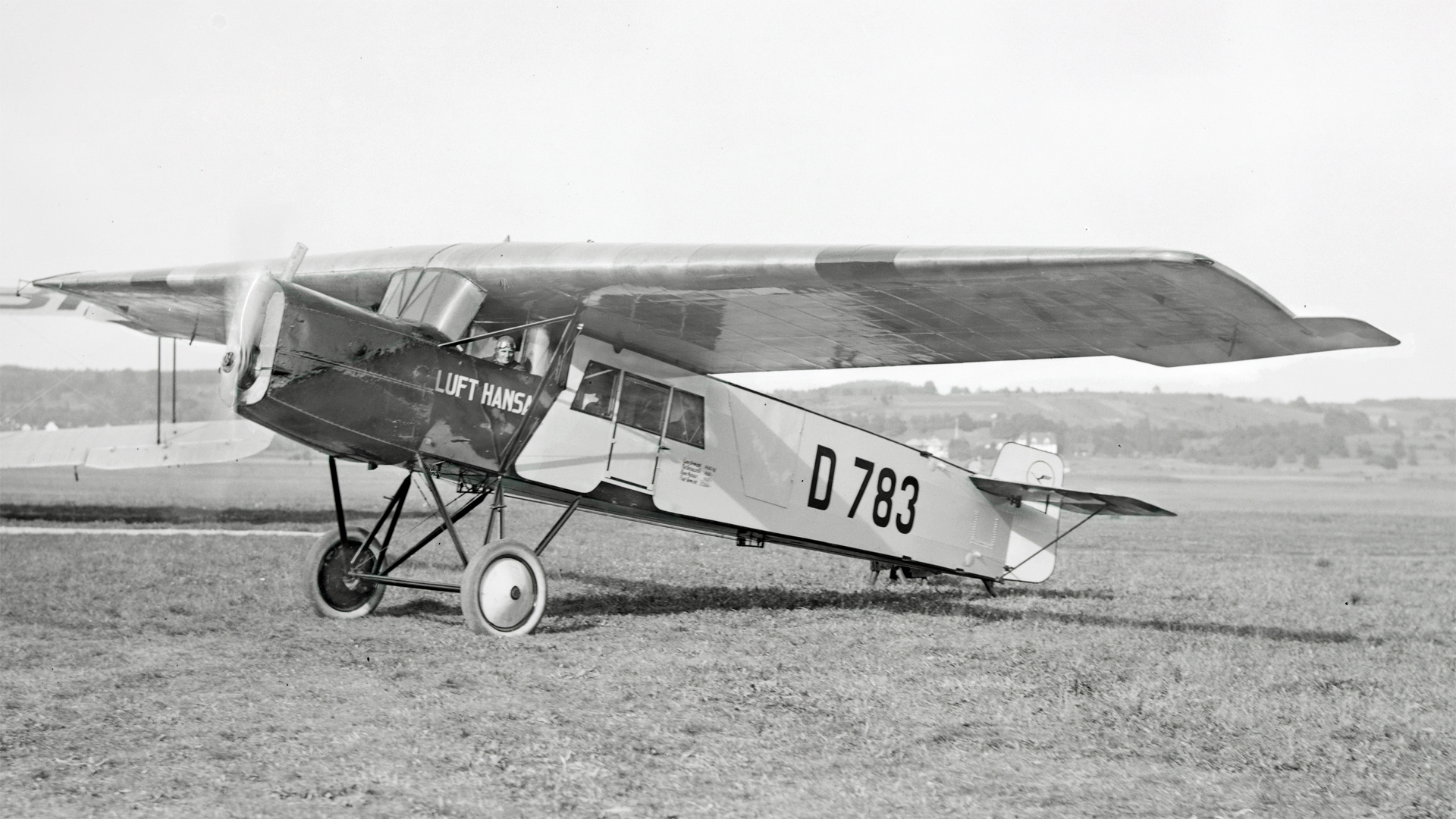 Fokker-Grulich F.II der LUFT HANSA (D 783) in Dübendorf